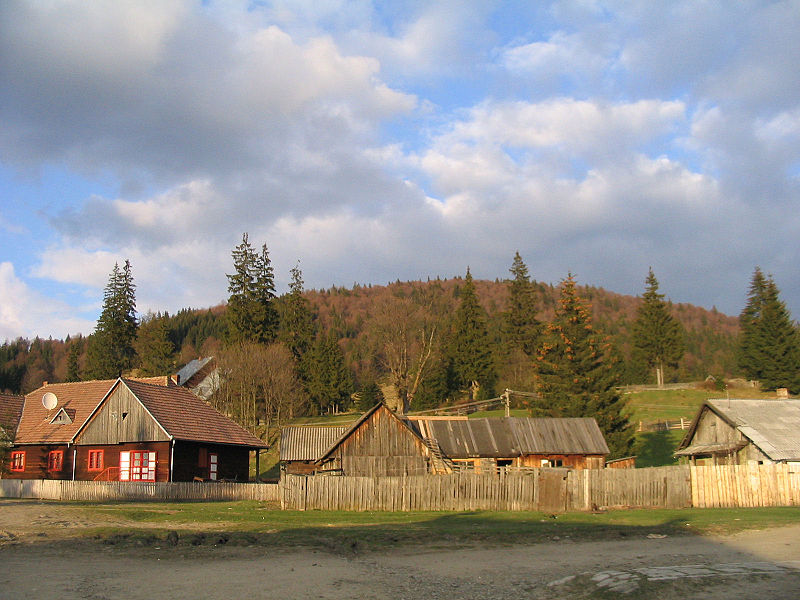 Kommandó